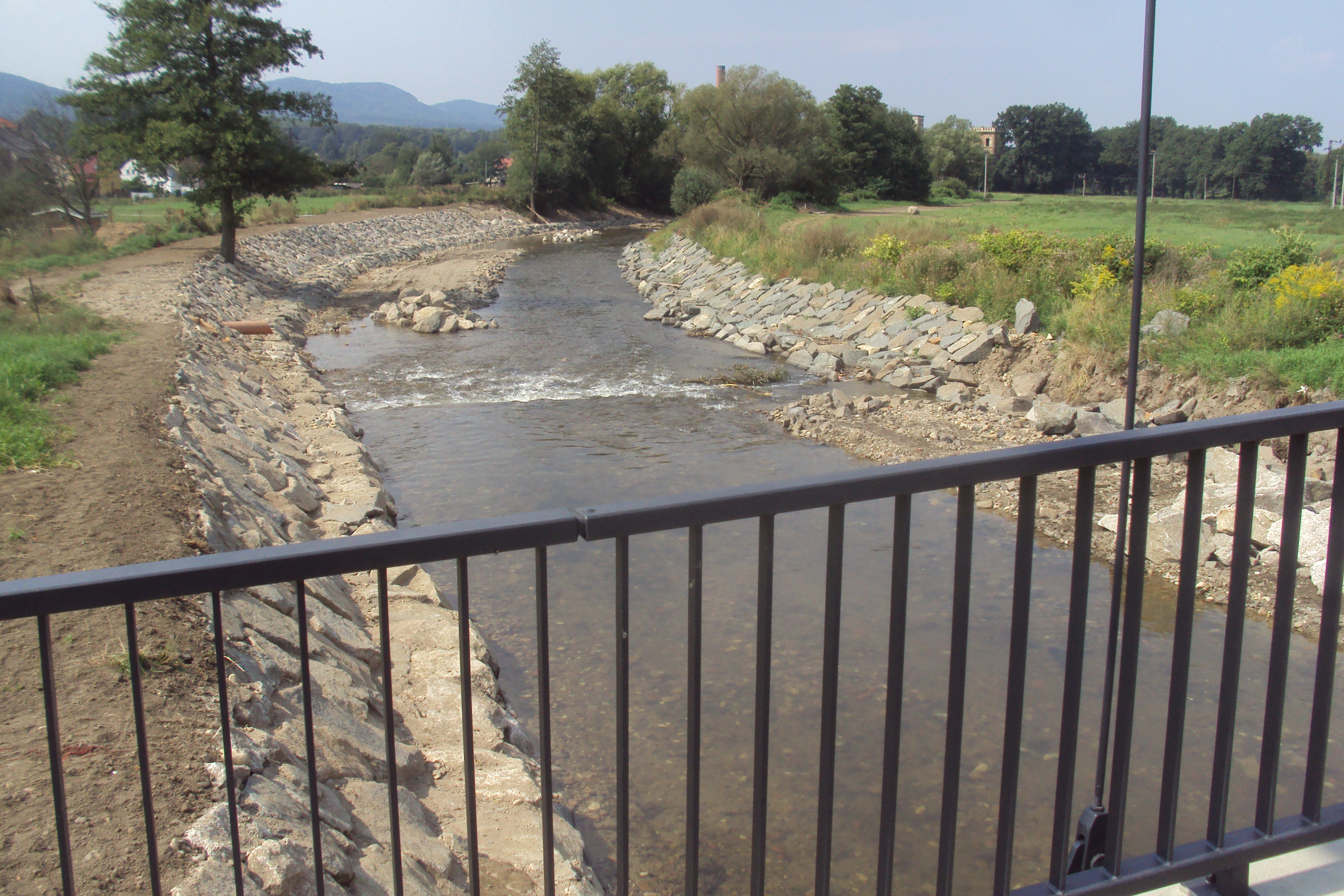 Lužická Nisa v Hrádku